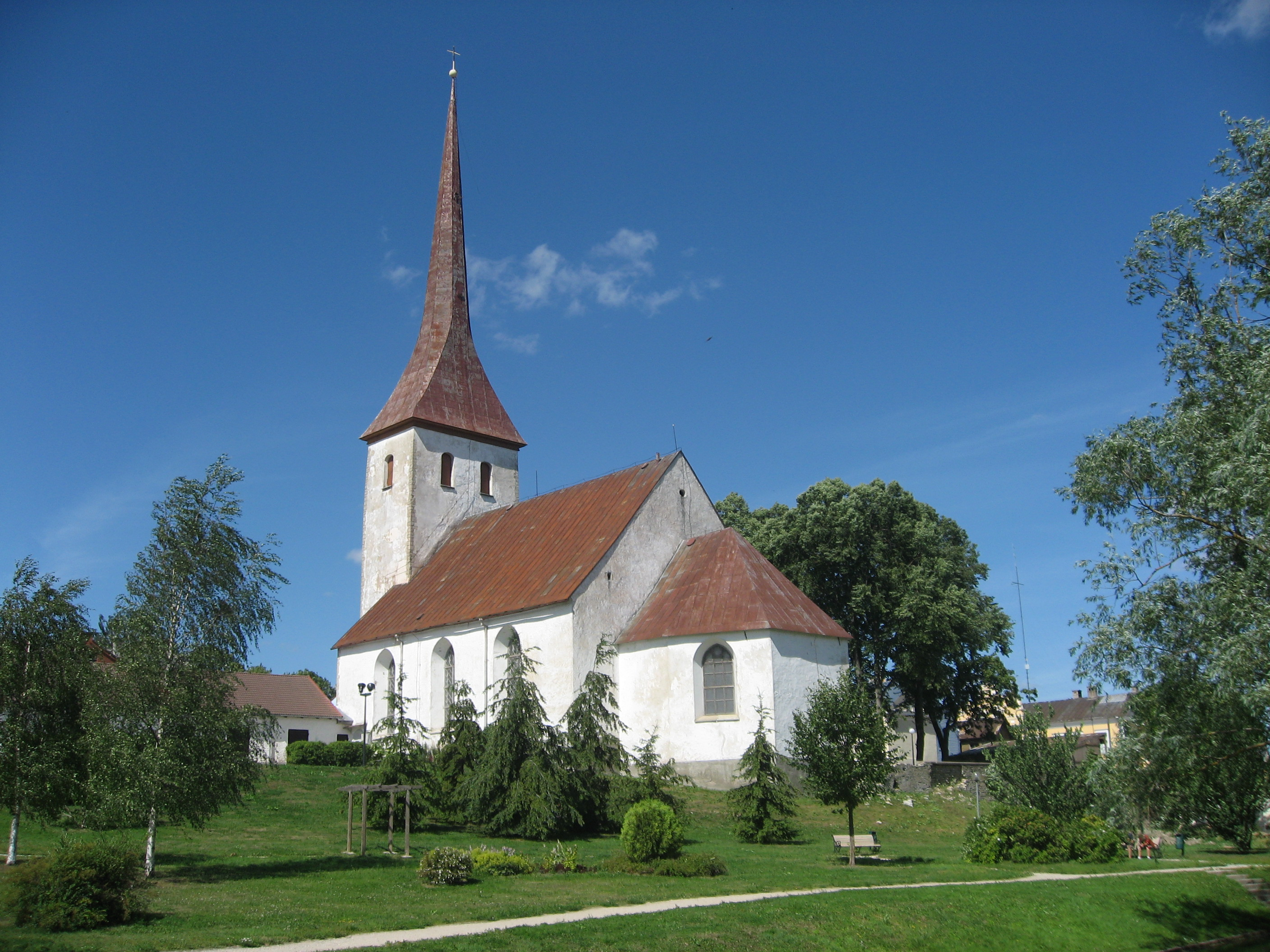 Rakvere, Kolmainu kirik